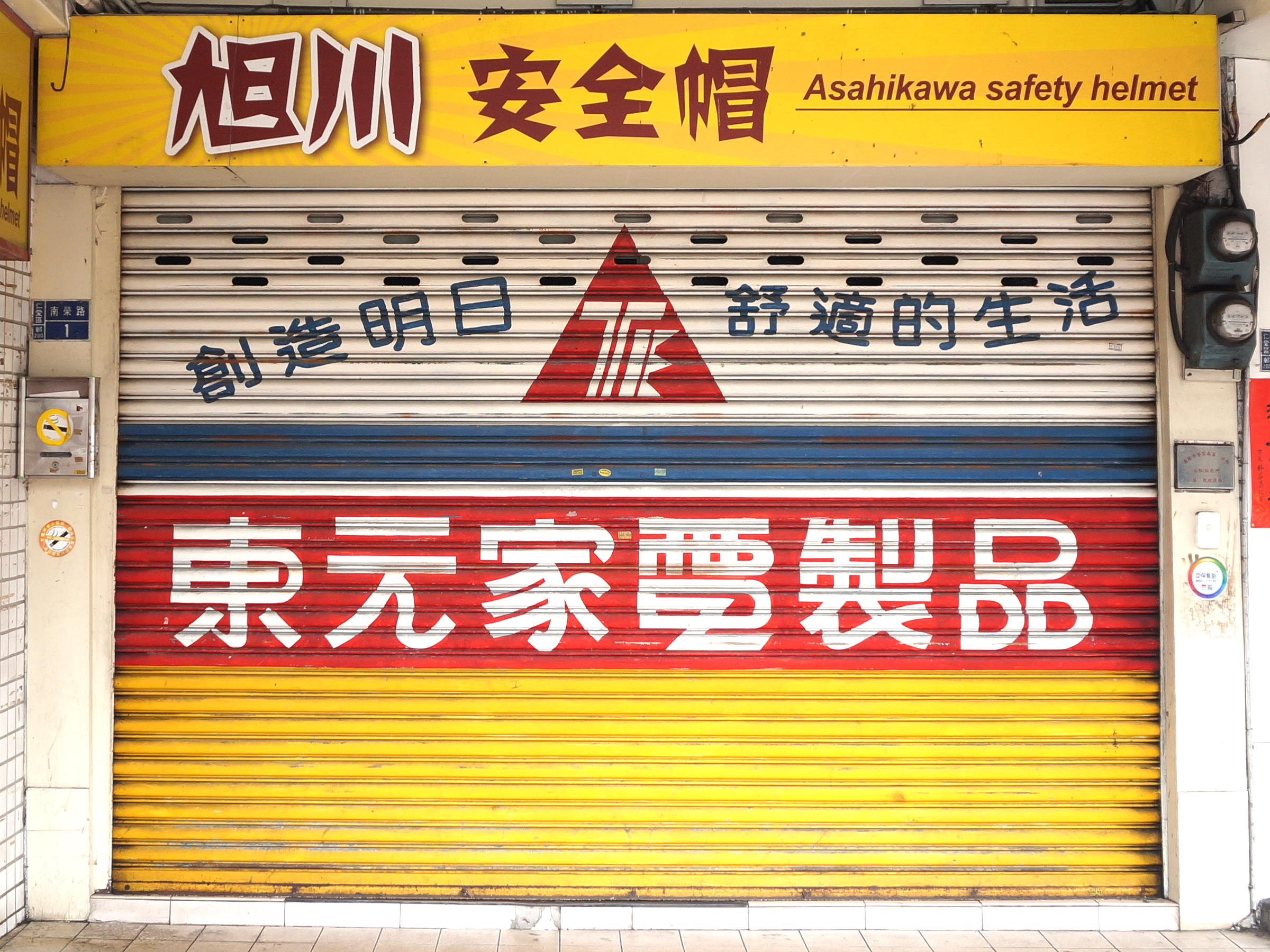 基隆市仁愛區南榮路1號1樓，1990年代東元電機家電製品經銷店鐵捲門彩繪格式，波浪形字體內容為「創造明日舒適的生活」。